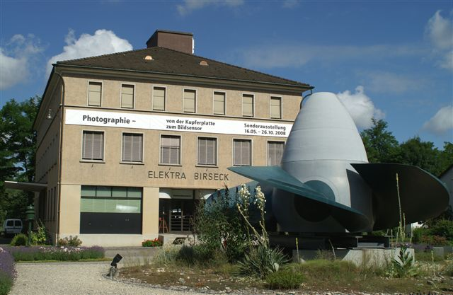 EBM Elektrizitätsmuseum, Weidenstrasse 8, 4142 Münchenstein, Schweiz